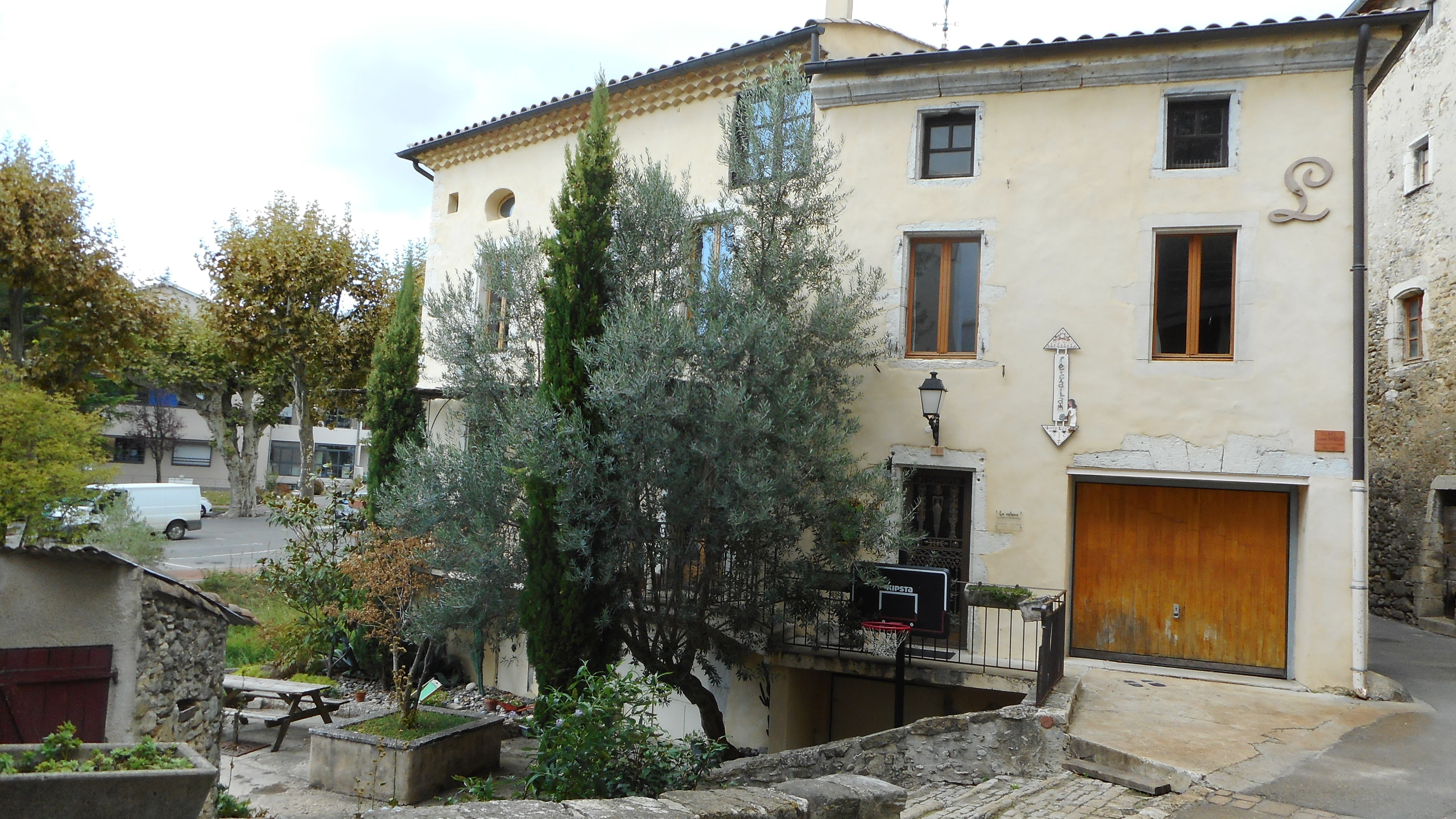 Maison de Jeanne Barnier à Dieulefit (Drôme)